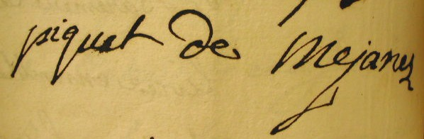 signature du Marquis de Méjanes sur le contrat de mariage de son cousin M. de Châteaufort